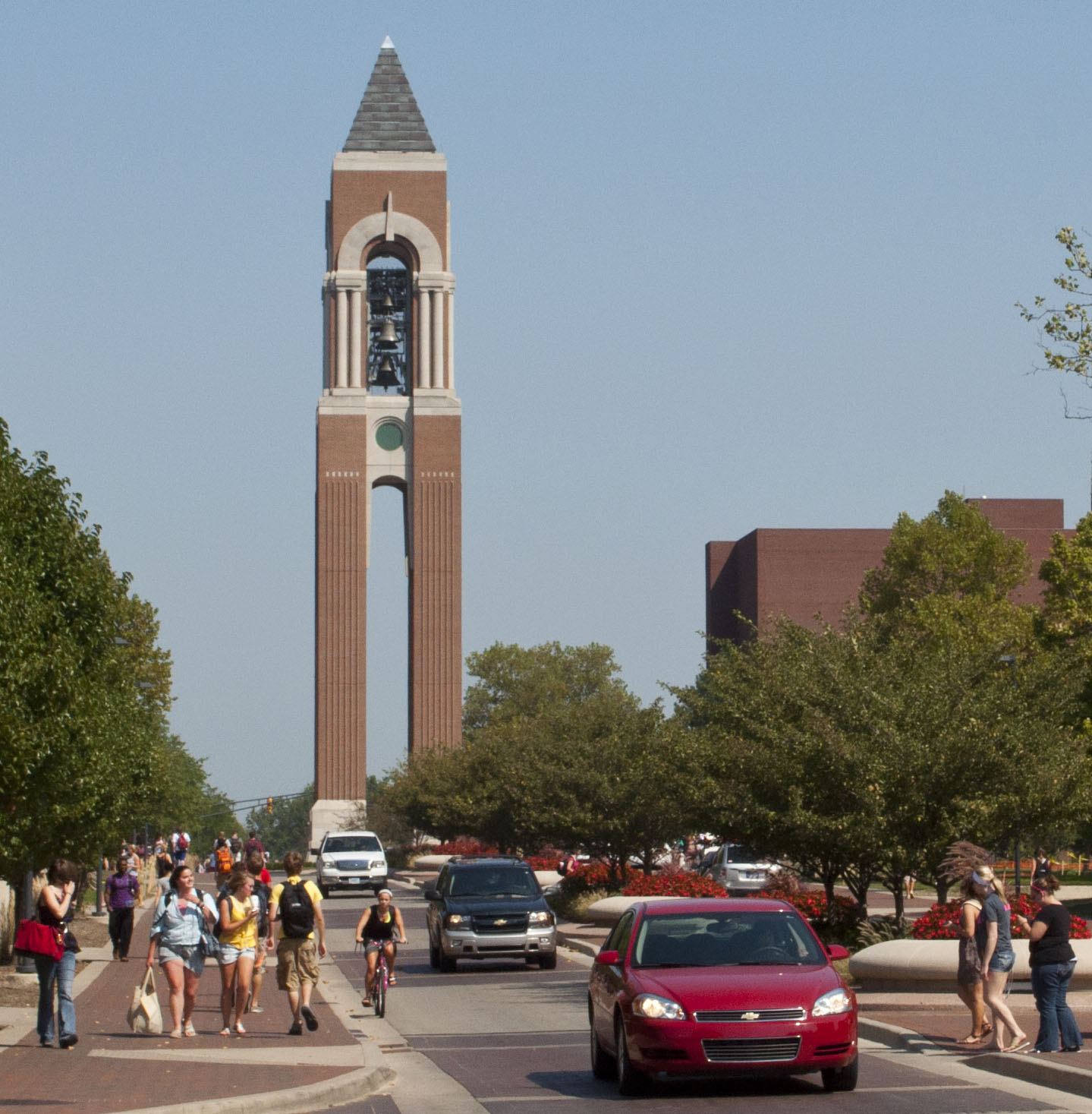 Muncie, Set/2011